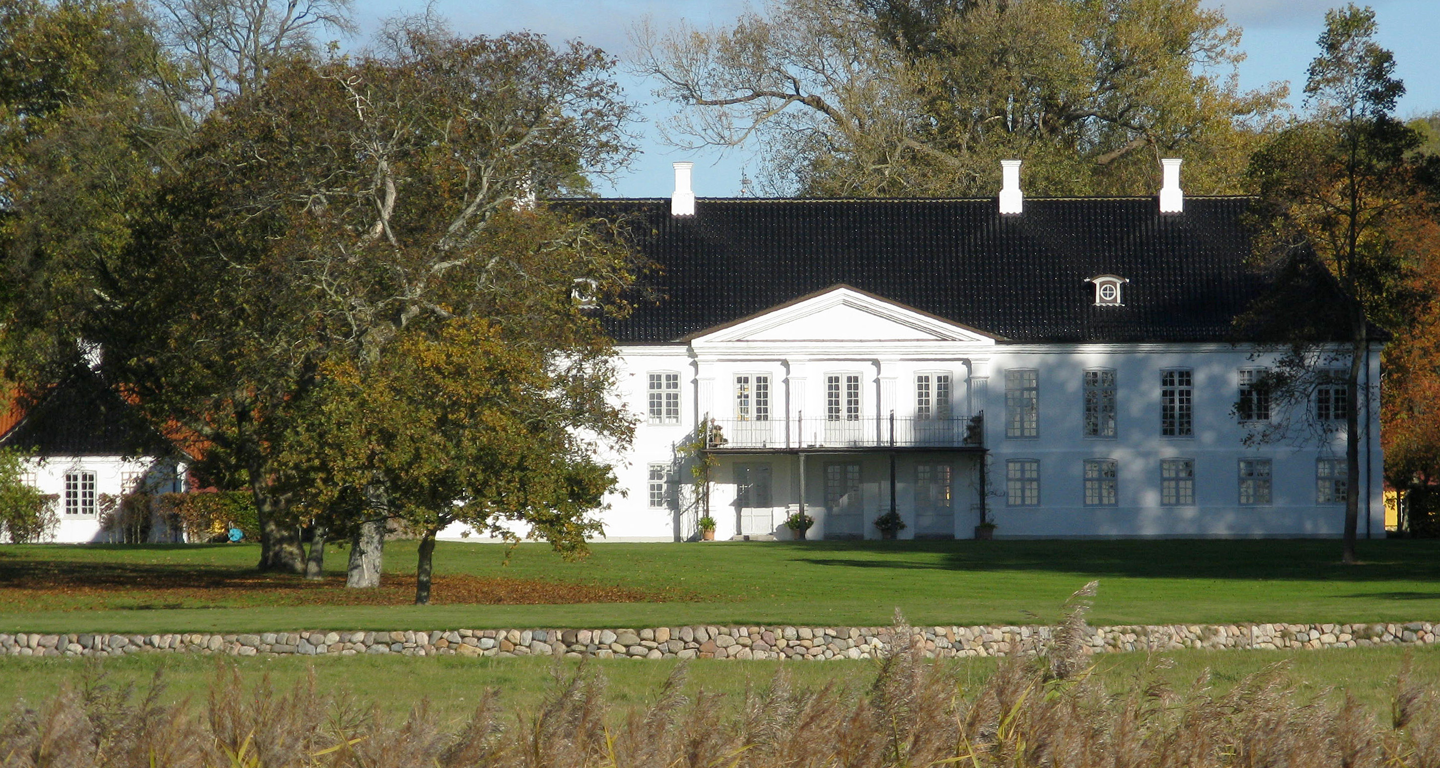 Gyllingnæs ligger i Gylling Sogn, Hads Herred, Odder Kommune. Næsset er udskilt fra Åkær Gods i 1801 af greve Friedrich Otto von Dernath. Gyllingnæs blev købet af den engelskfødte købmand John Smith. Hovedbygningen på Gyllingnæs er opført i 1865.